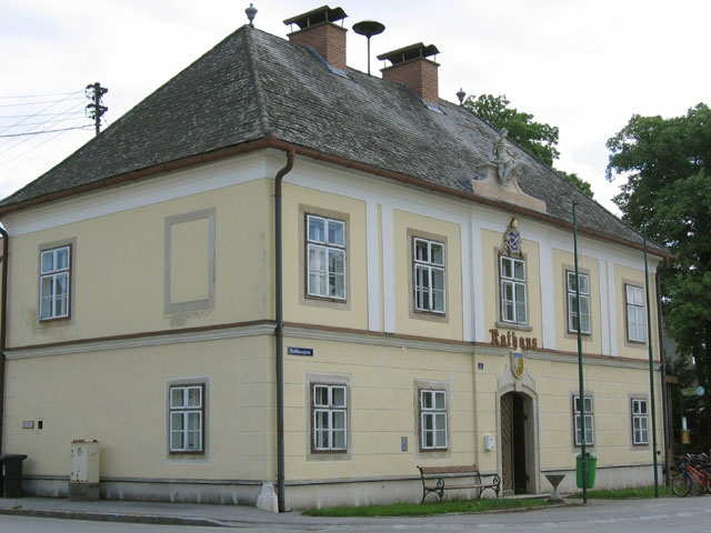 Rathaus Weikendorf: Lizenz: GNU FDL Datum: de:2004 Ort: Weikendorf, Niederösterreich